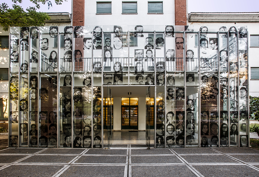 Ingreso al Museo.